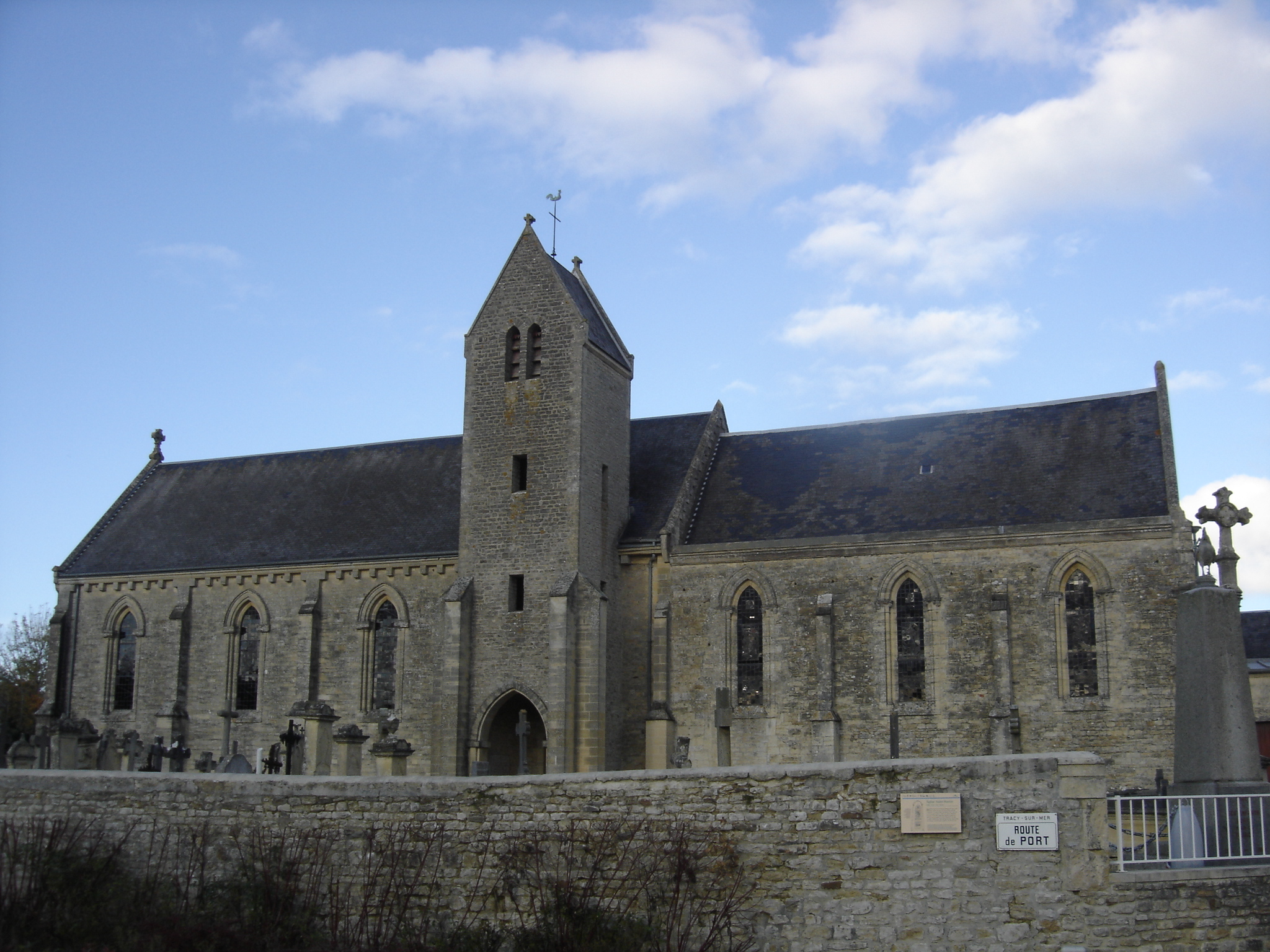 façade sud de l'église Saint-Martin